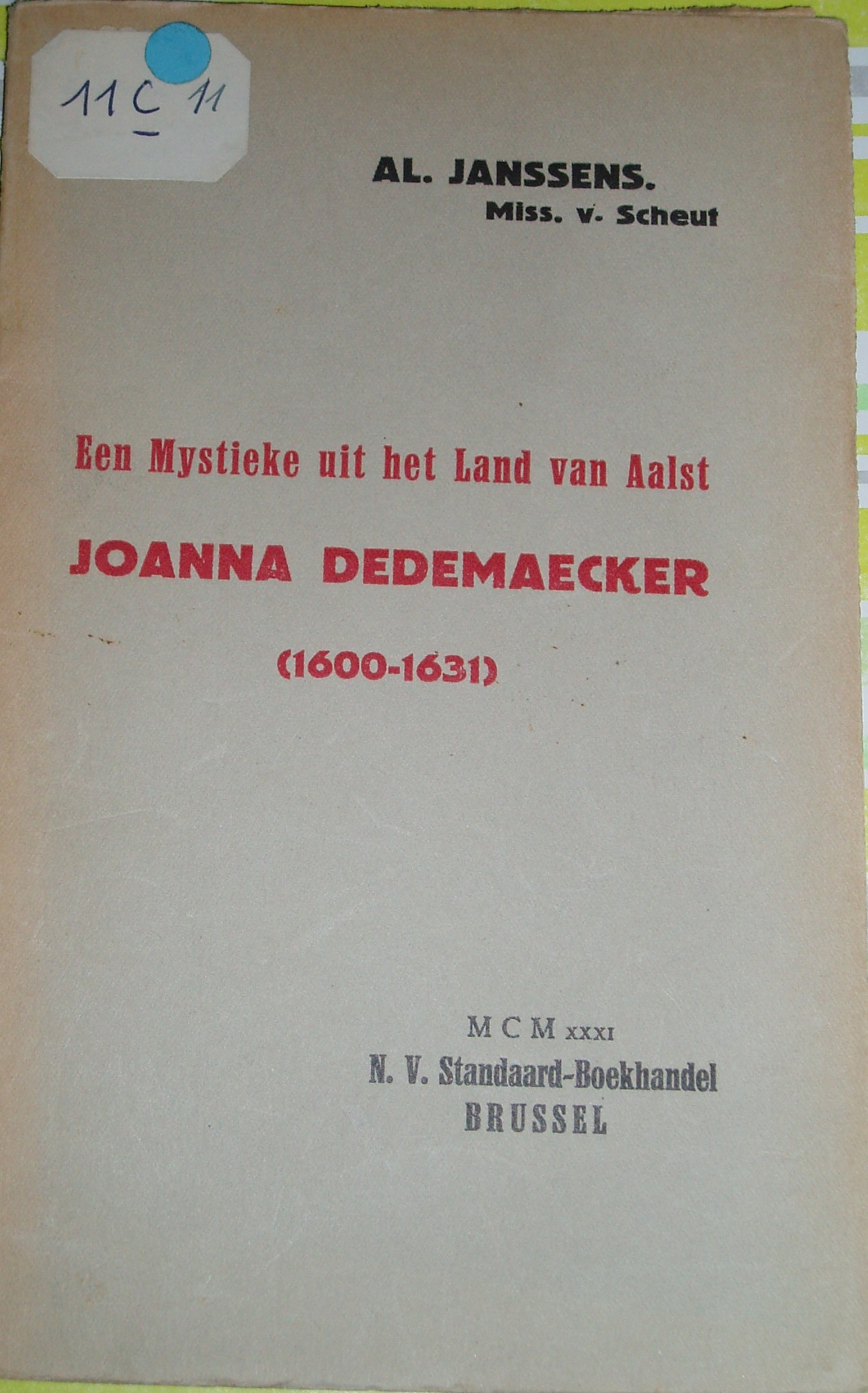 Kaft van boek over Joanna Dedemaecker uit 1931